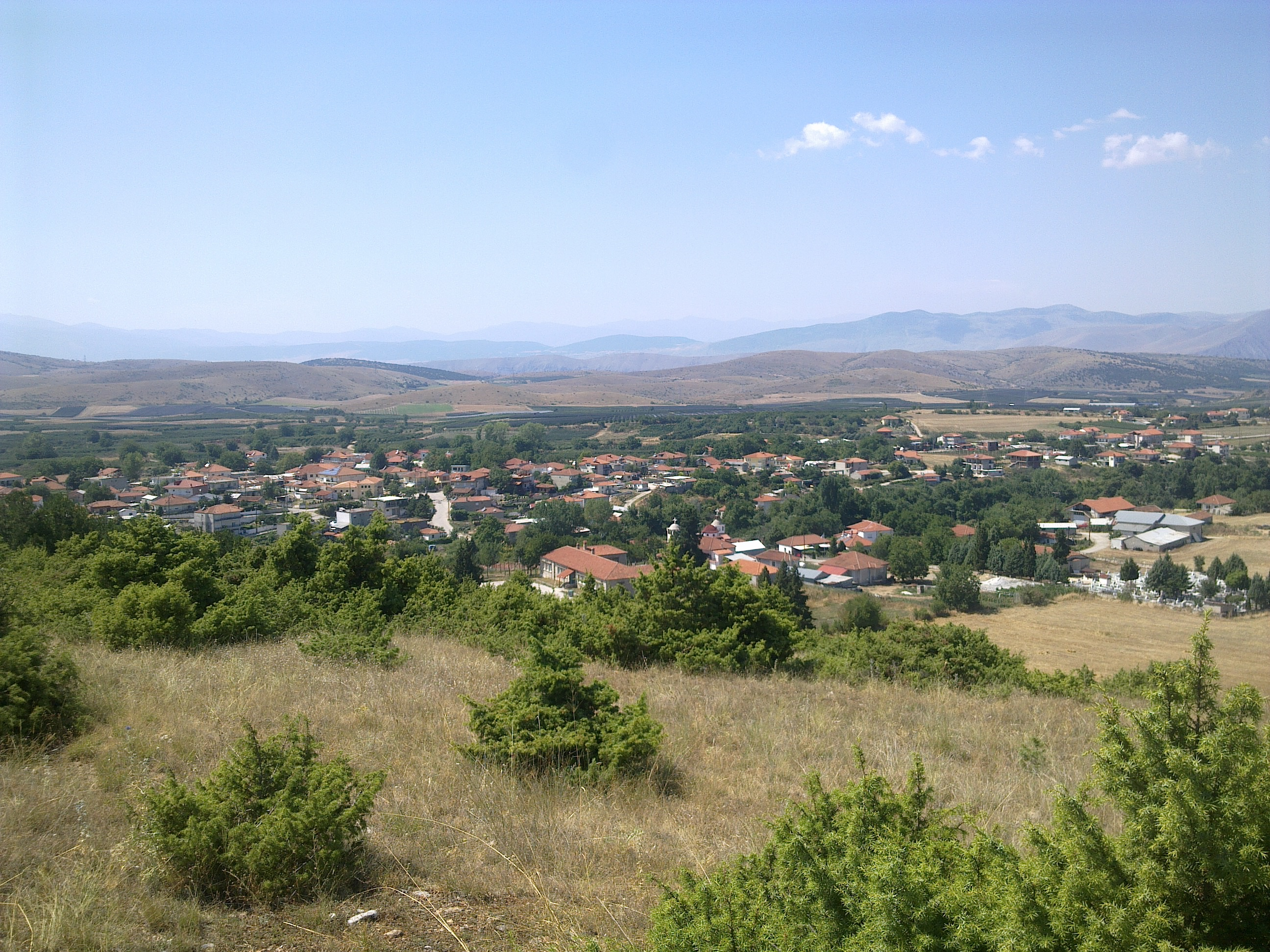 Катраница от хълма Свети Константин.